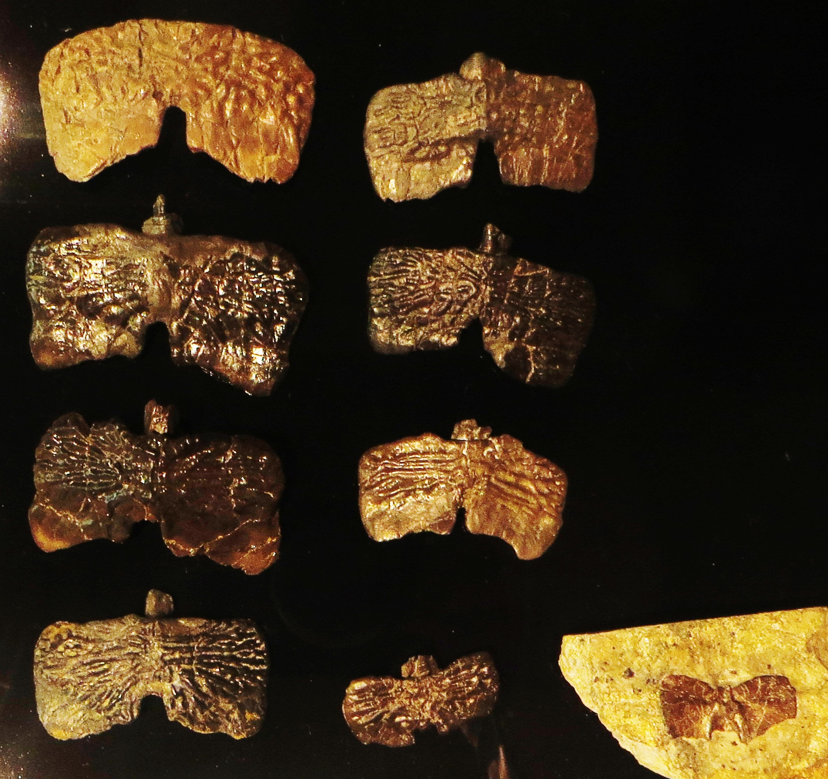 Took the picture at Muschelkalkmuseum Ingelfingen